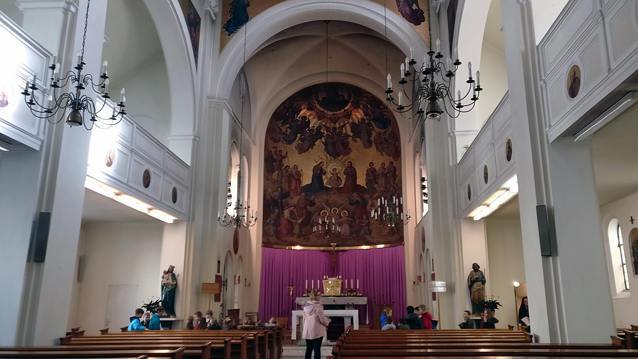 Klosterkirche vom Armen Kinde Jesu, Wien